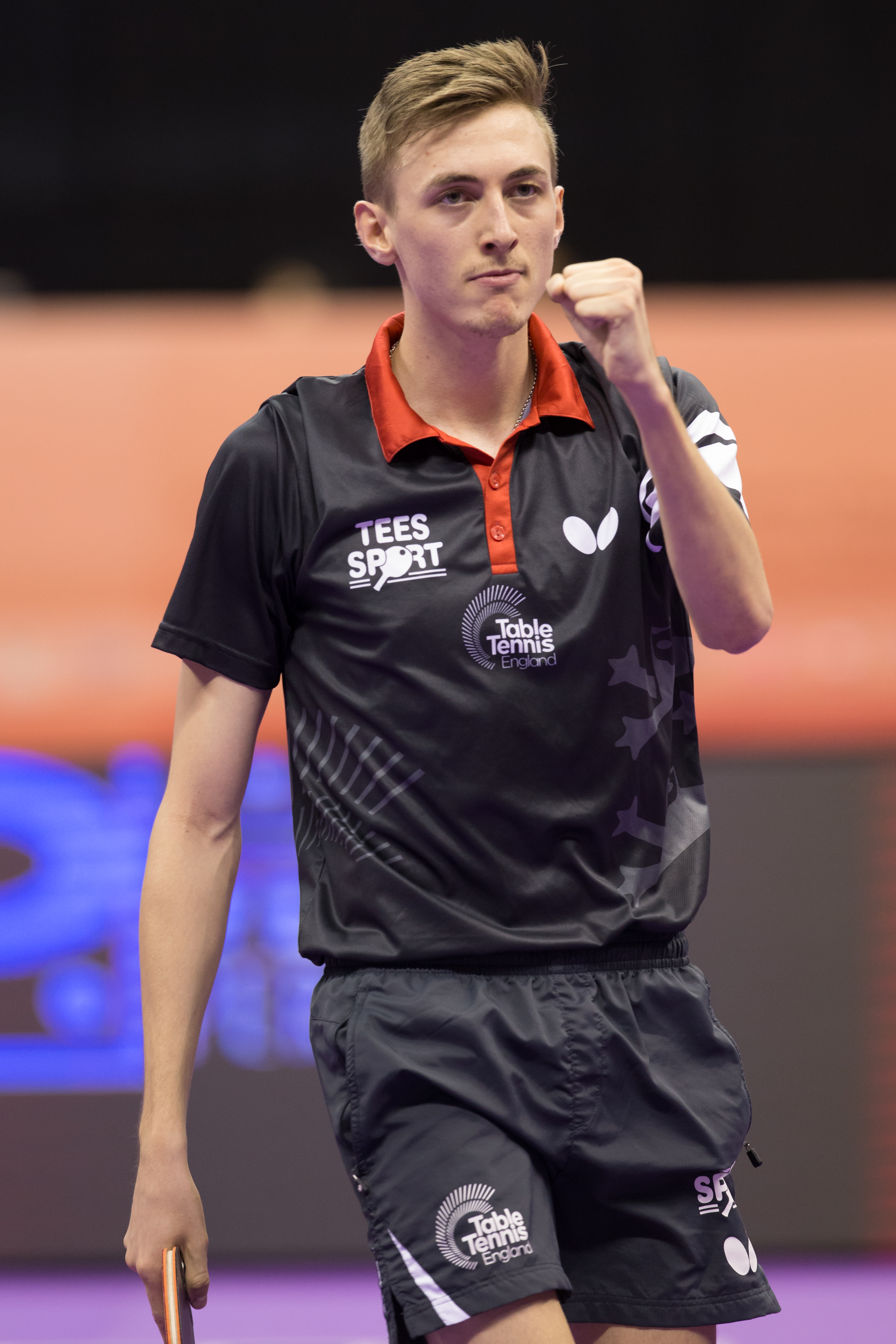 _K0K4344